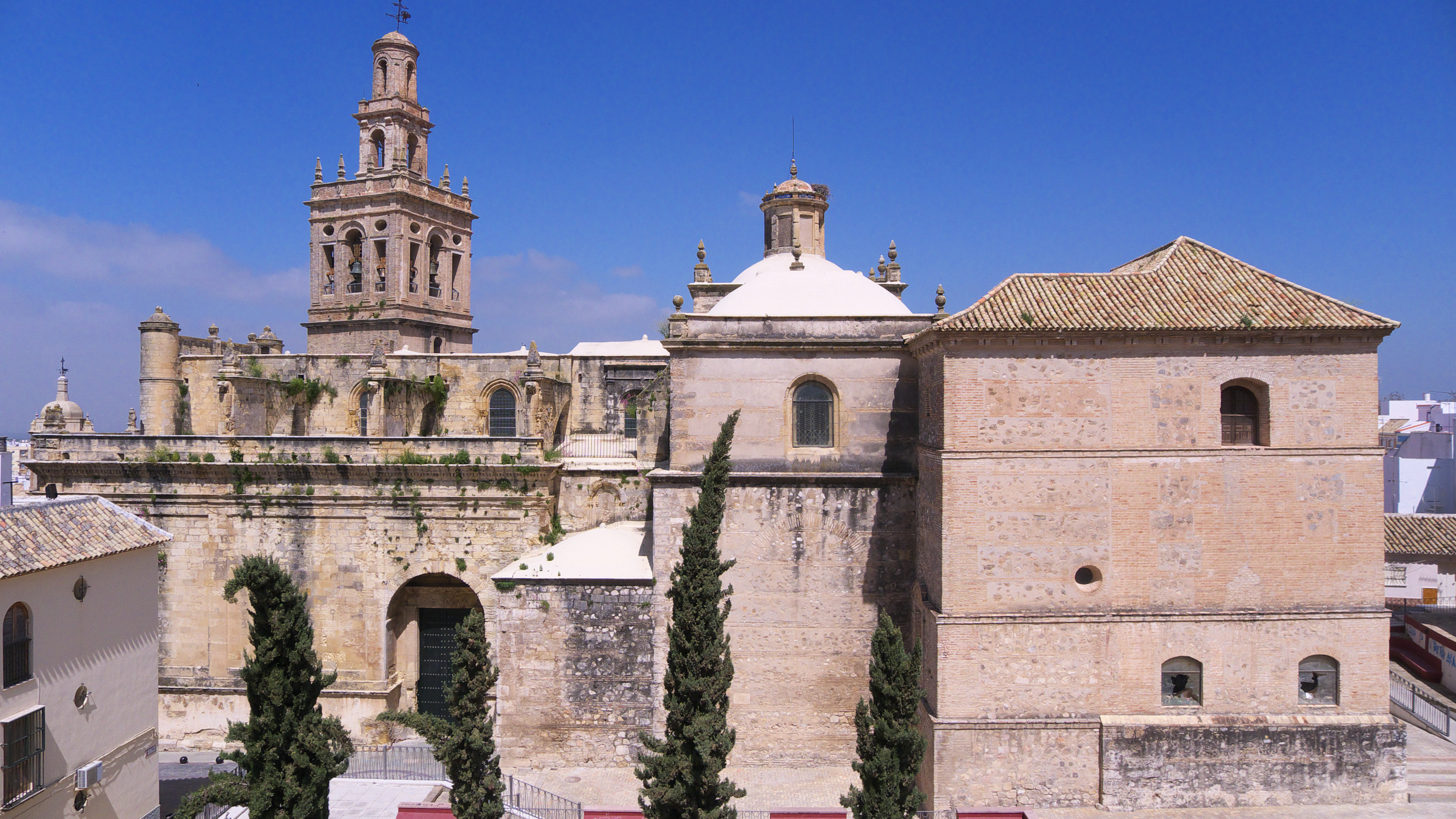 Comienza las obras, Antón Ruiz en 1508. Entre 1526 y 1529 interviene Diego de Riaño. Hasta 1550 queda paralizada la fábrica, que la continúa Martín de Gainza. Con Hernán Ruiz II y Vermondo Resta queda terminada, en las primeras décadas del siglo XVII.